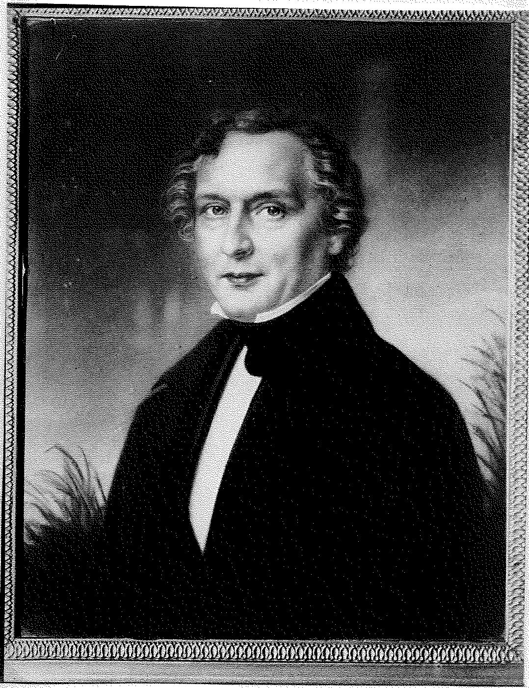 Fotographie eines Gemäldes aus Familienbesitz